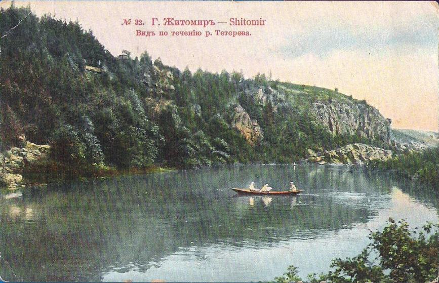 Вид на річку Тетерев поблизу Житомира, листівка поч. 20 ст.